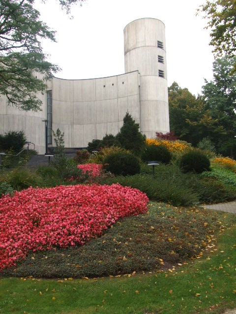 Kloster Untermarchtal, Untermarchtal, Alb-Donau-Kreis, Baden-Württemberg Neue Mutterhauskirche